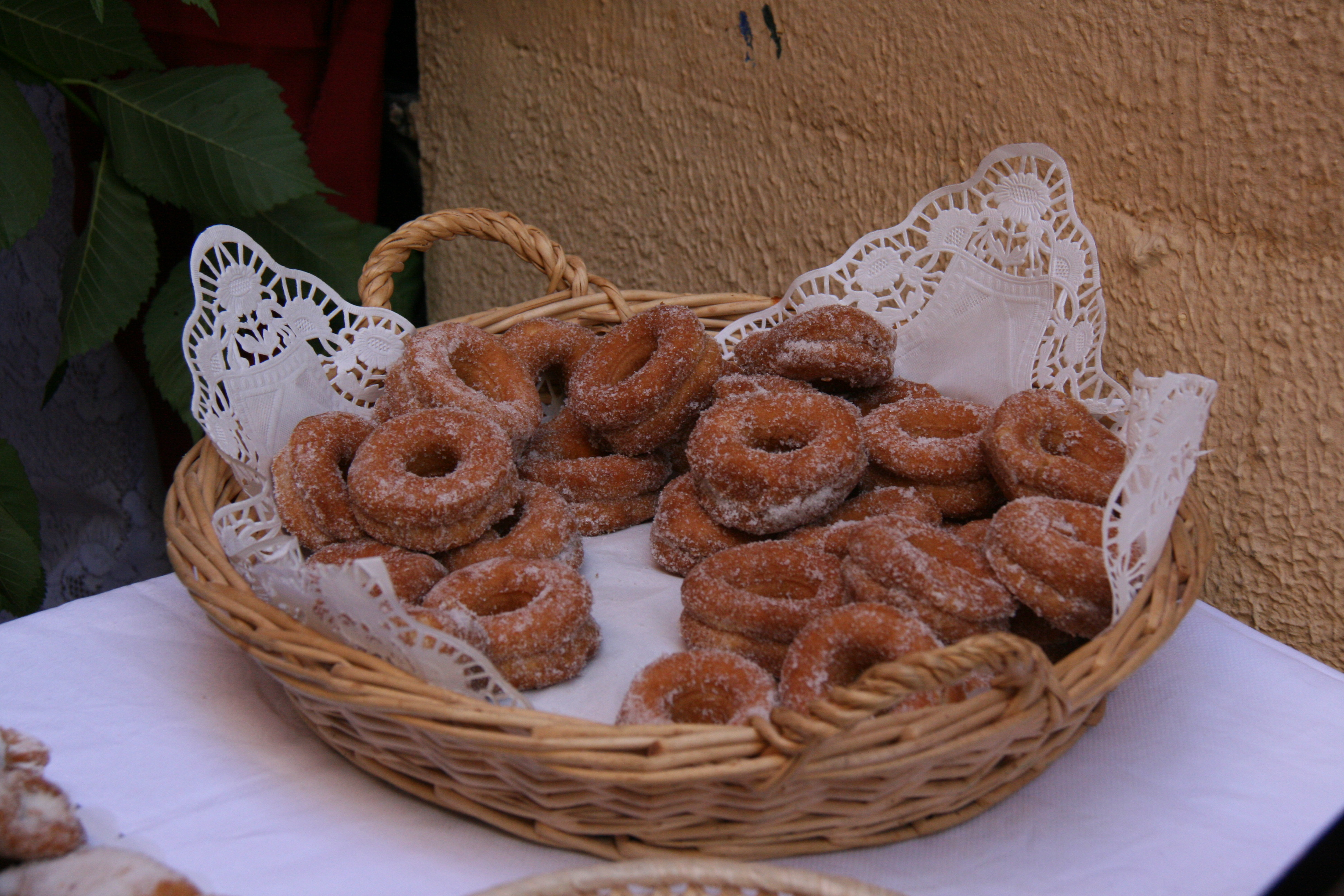 Cesta de Rosquillas durante la celebración de las Mayas